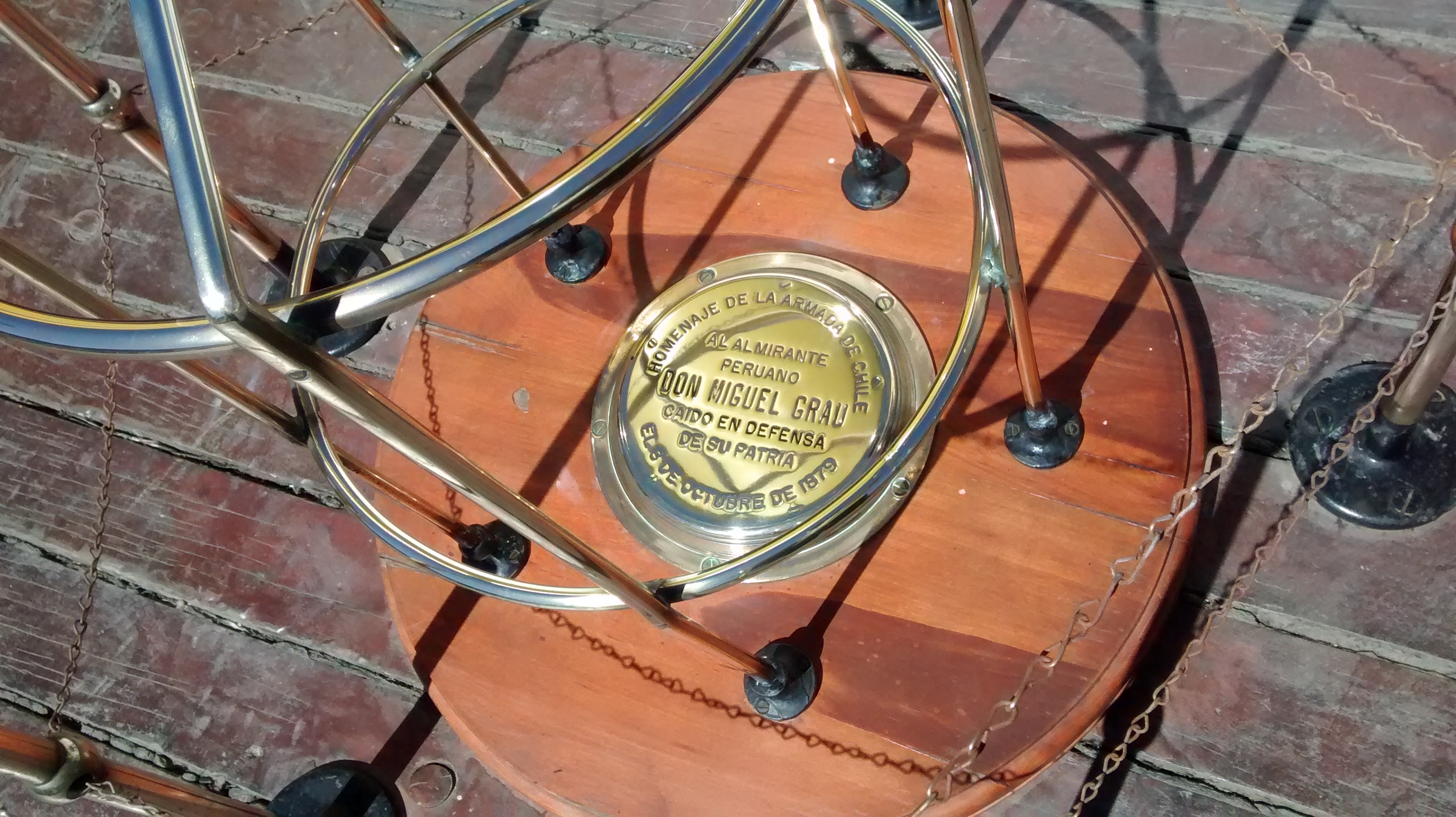 Lugar en el Huascar, donde cayó el Almirante peruano Miguel Grau. Homenaje de la Armada de Chile